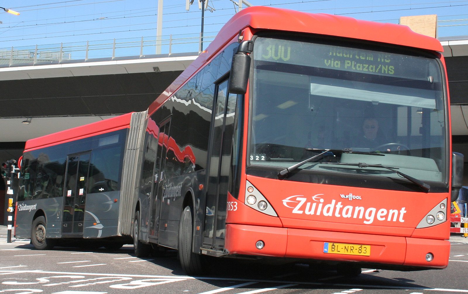 Zuidtangent. Van Hool bus.